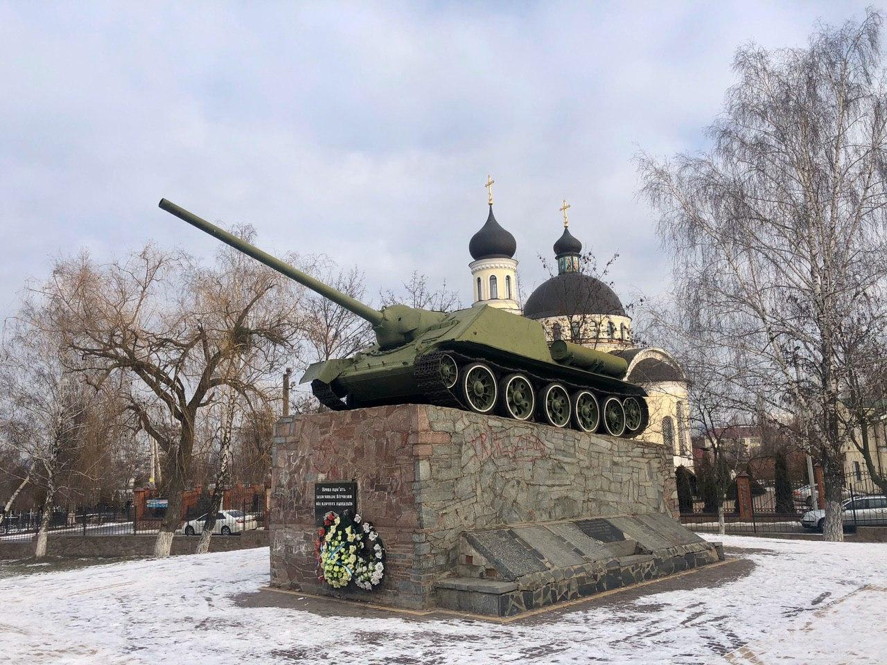 СУ-100 село Софіївська Борщагівка, Україна.